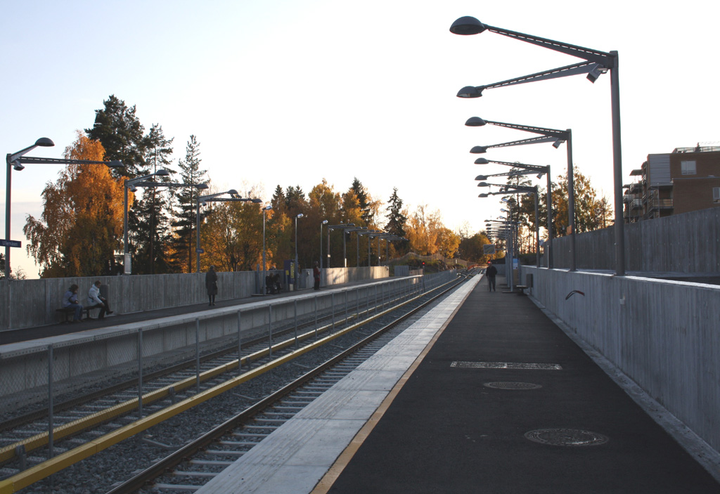 Ullernåsen T-banestasjon sett fra plattformen mot Åsjordet T-banestasjon.